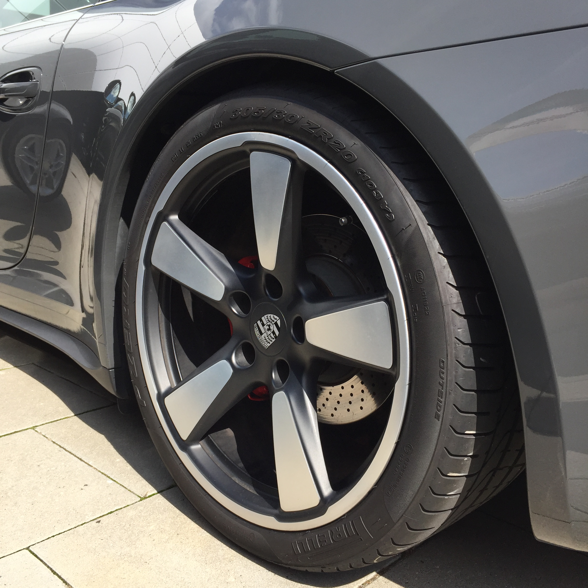 Porsche 911 50 Jahre Fuchsfelge